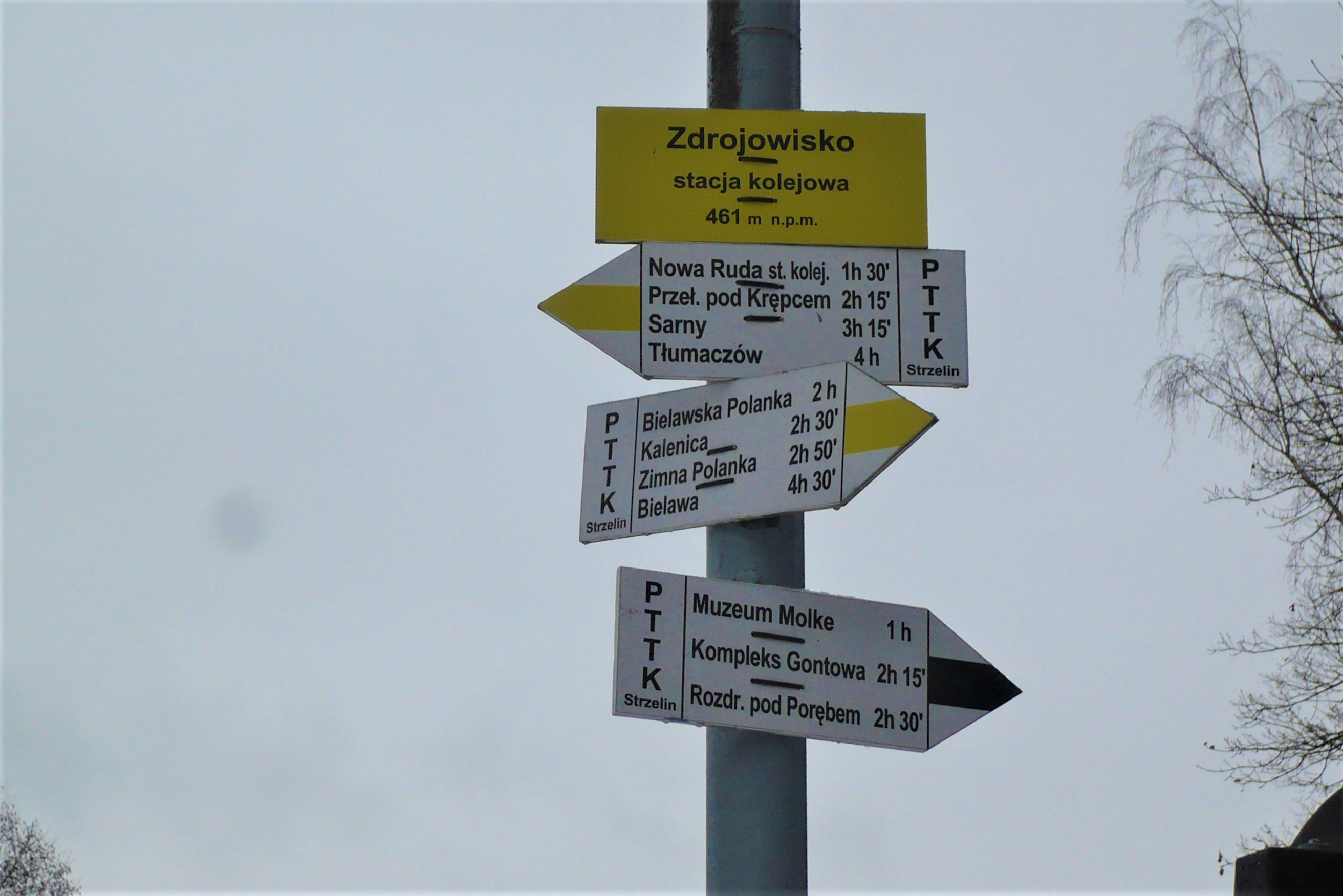 Nowa Ruda - Zdrojowisko